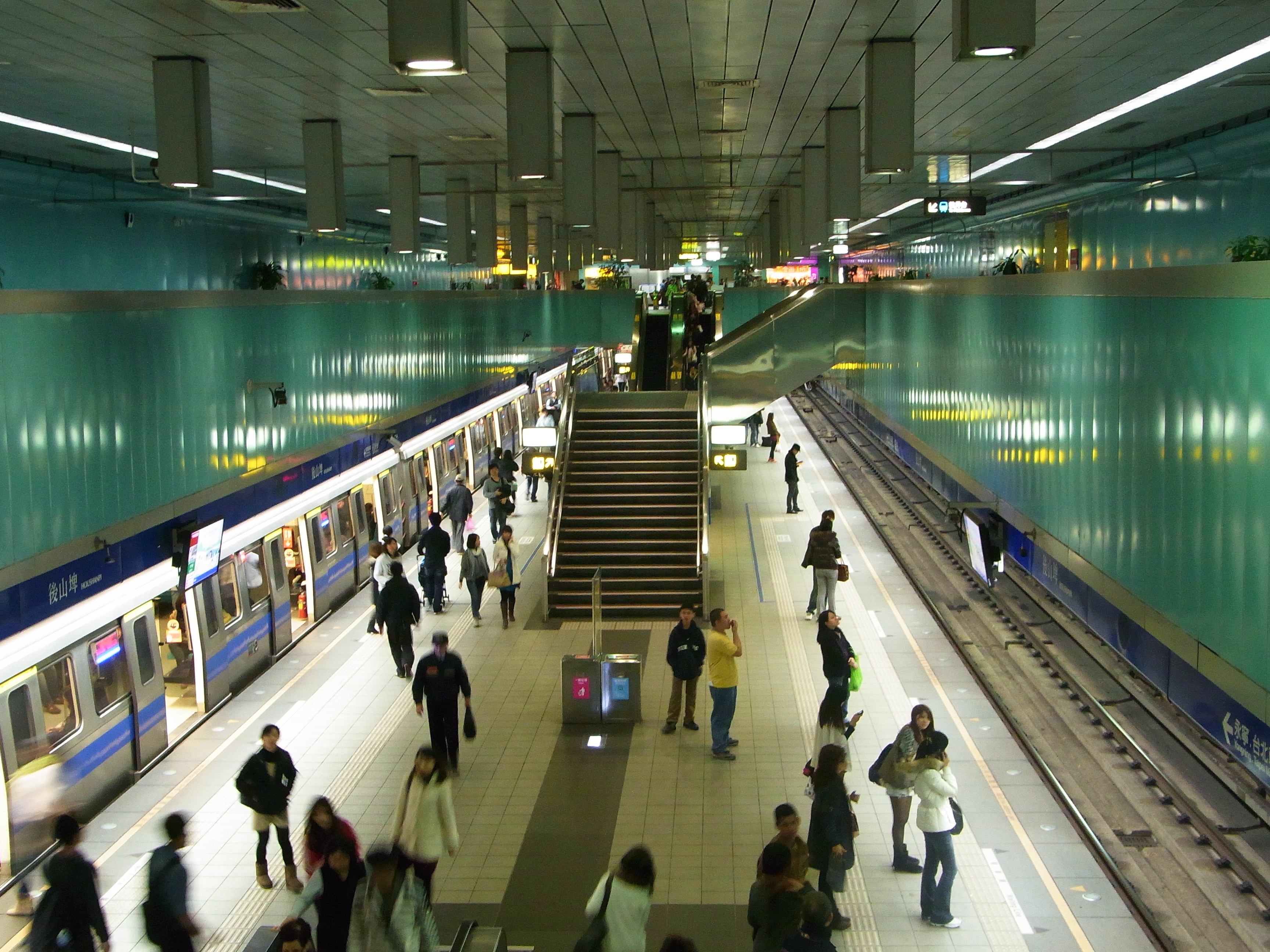 台北捷運後山埤站月台